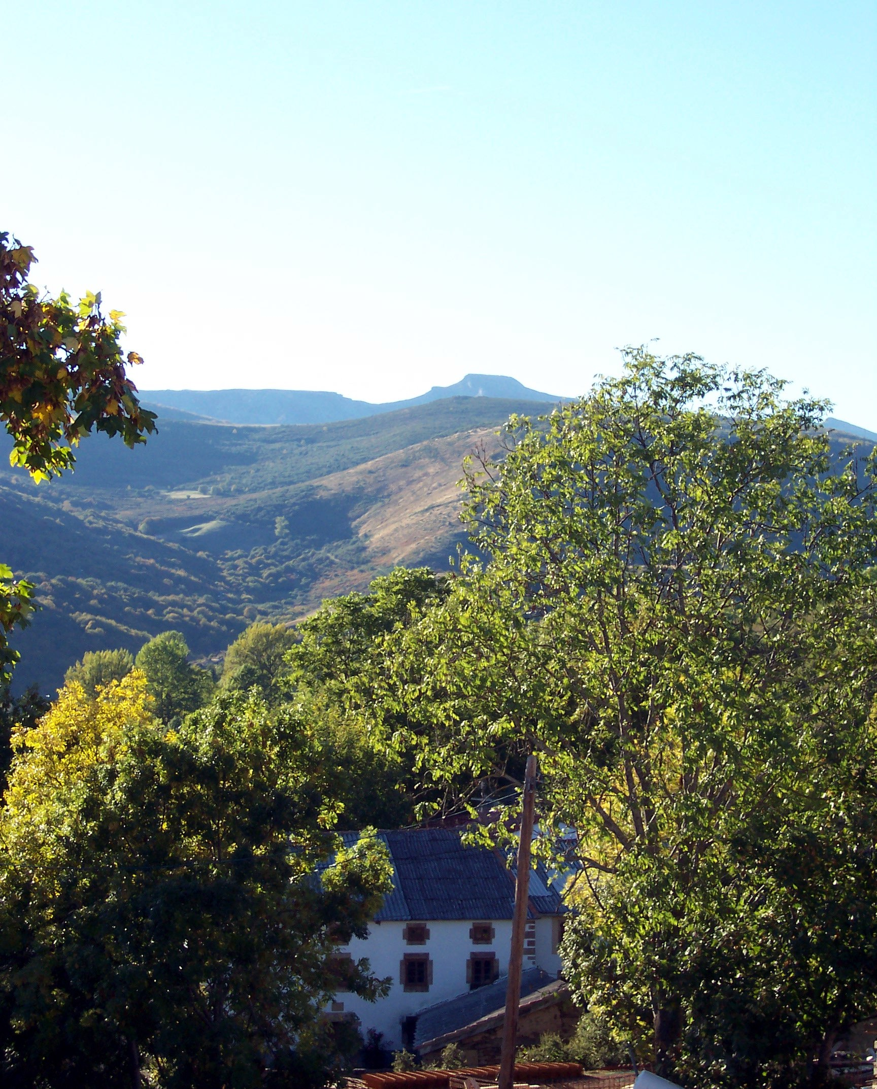 Cima del Cuchillón desde Abiada